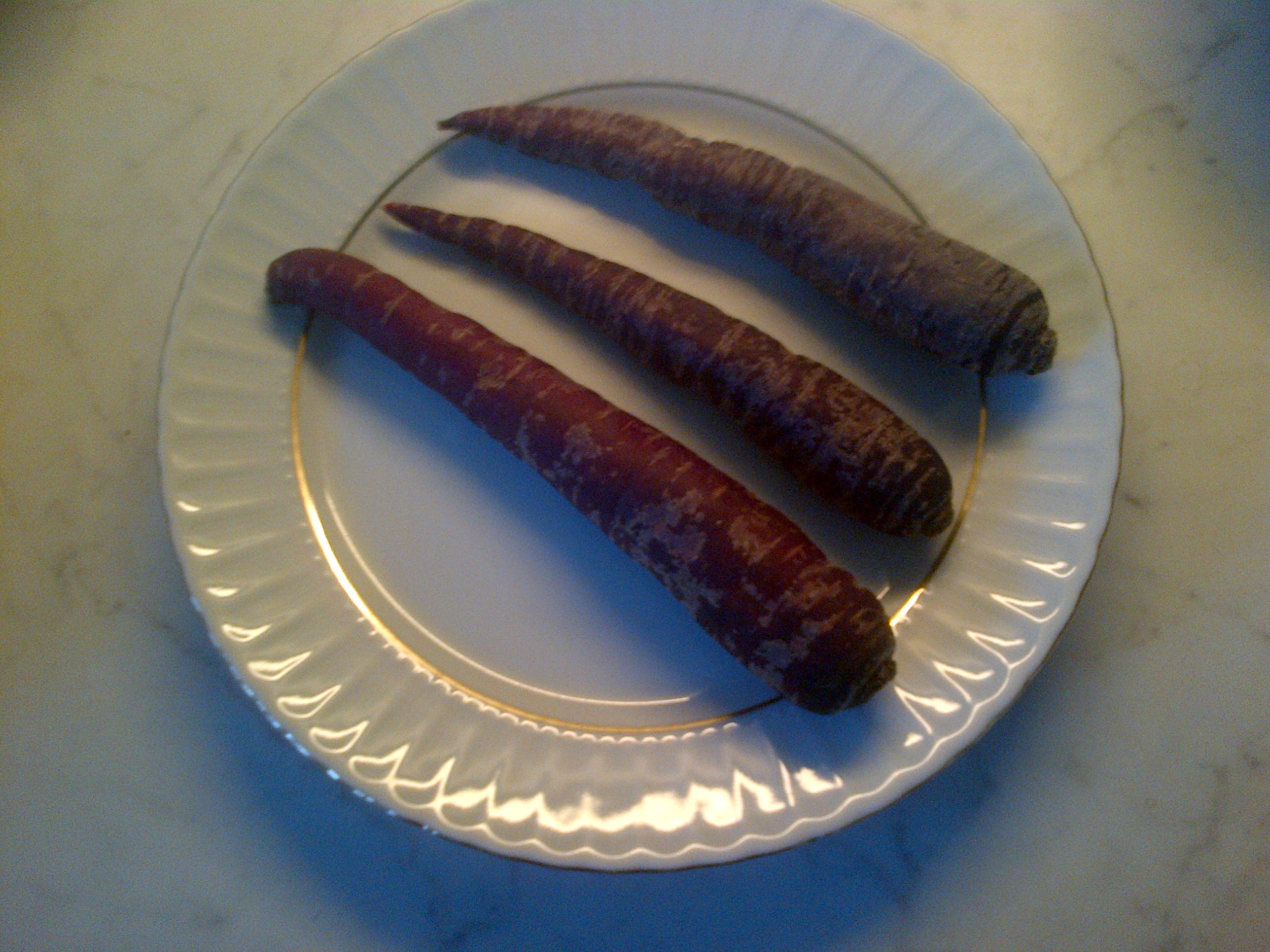 Zanahorias negras, se comen en tiras julianas dentro de "şalgam suyu".